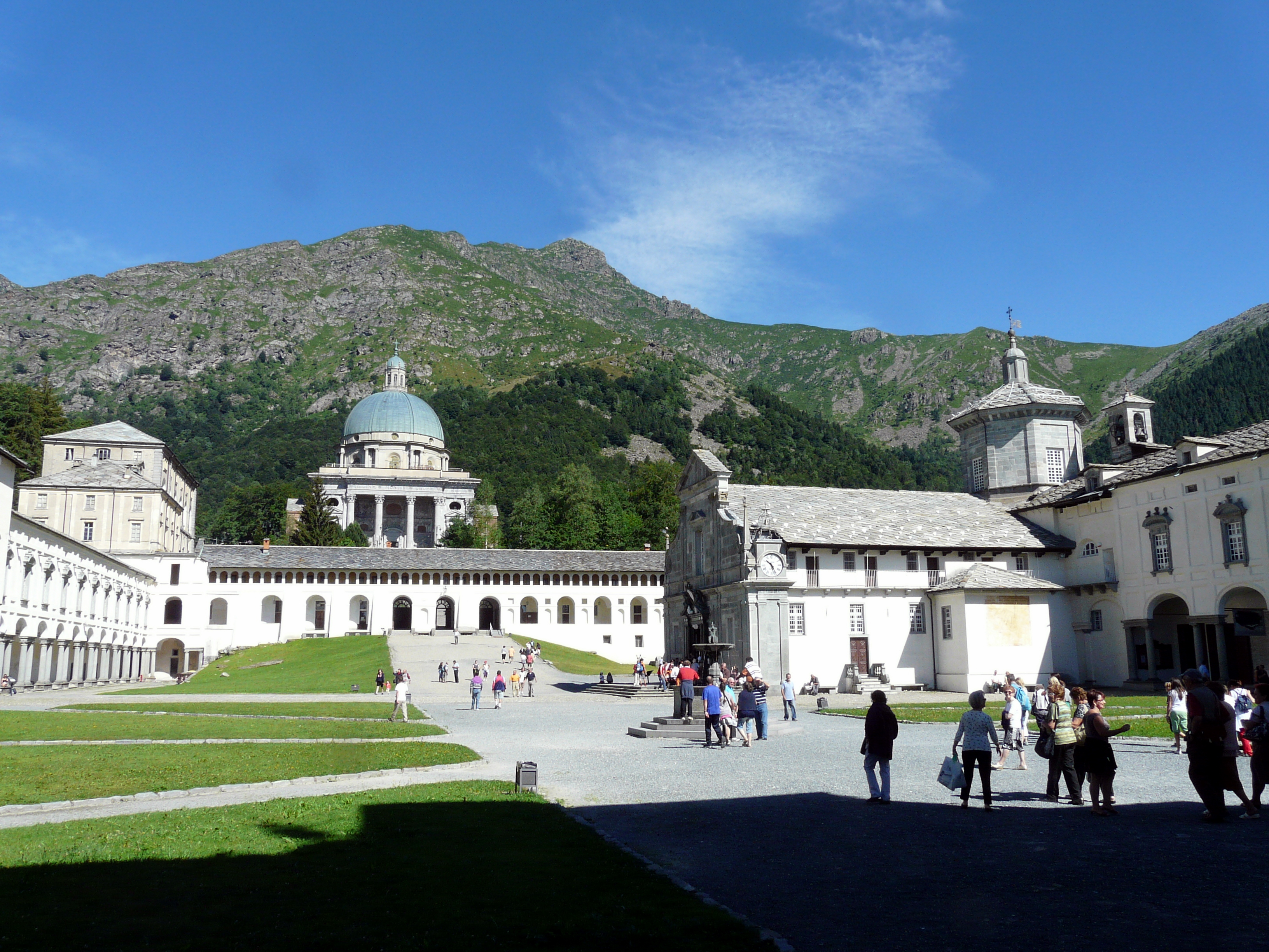 Serie di immagini del Santuario di Oropa, Piemonte, Italia